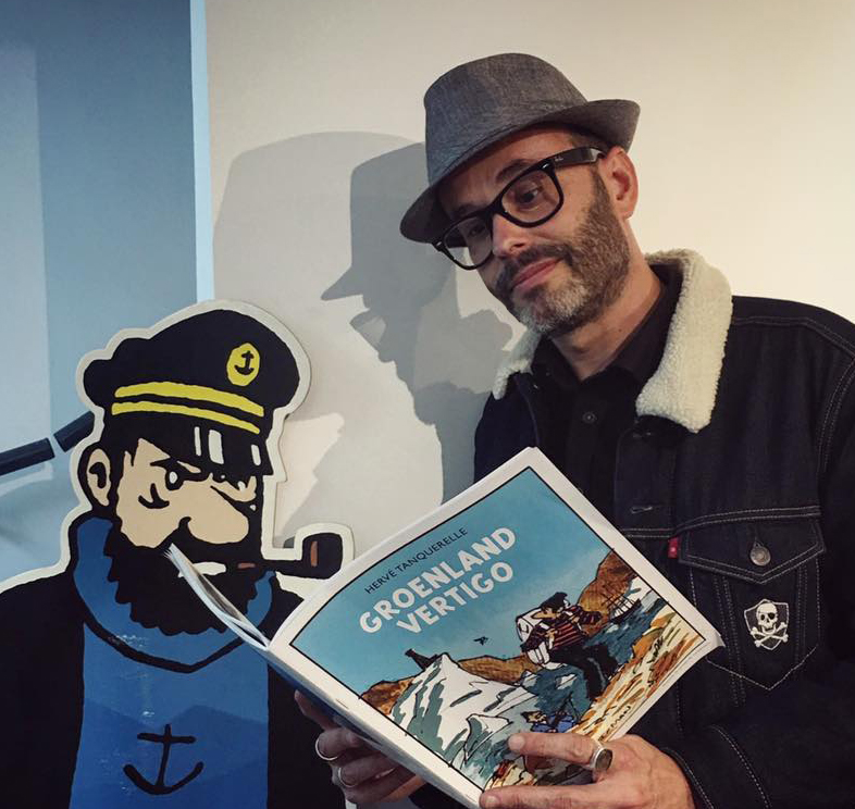 Portrait d'Hervé Tanquerelle